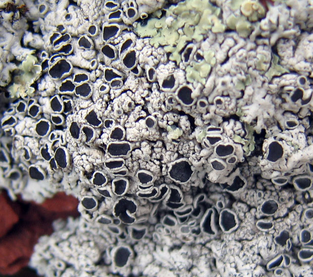 Lišaj na Midžoru, Stara planina